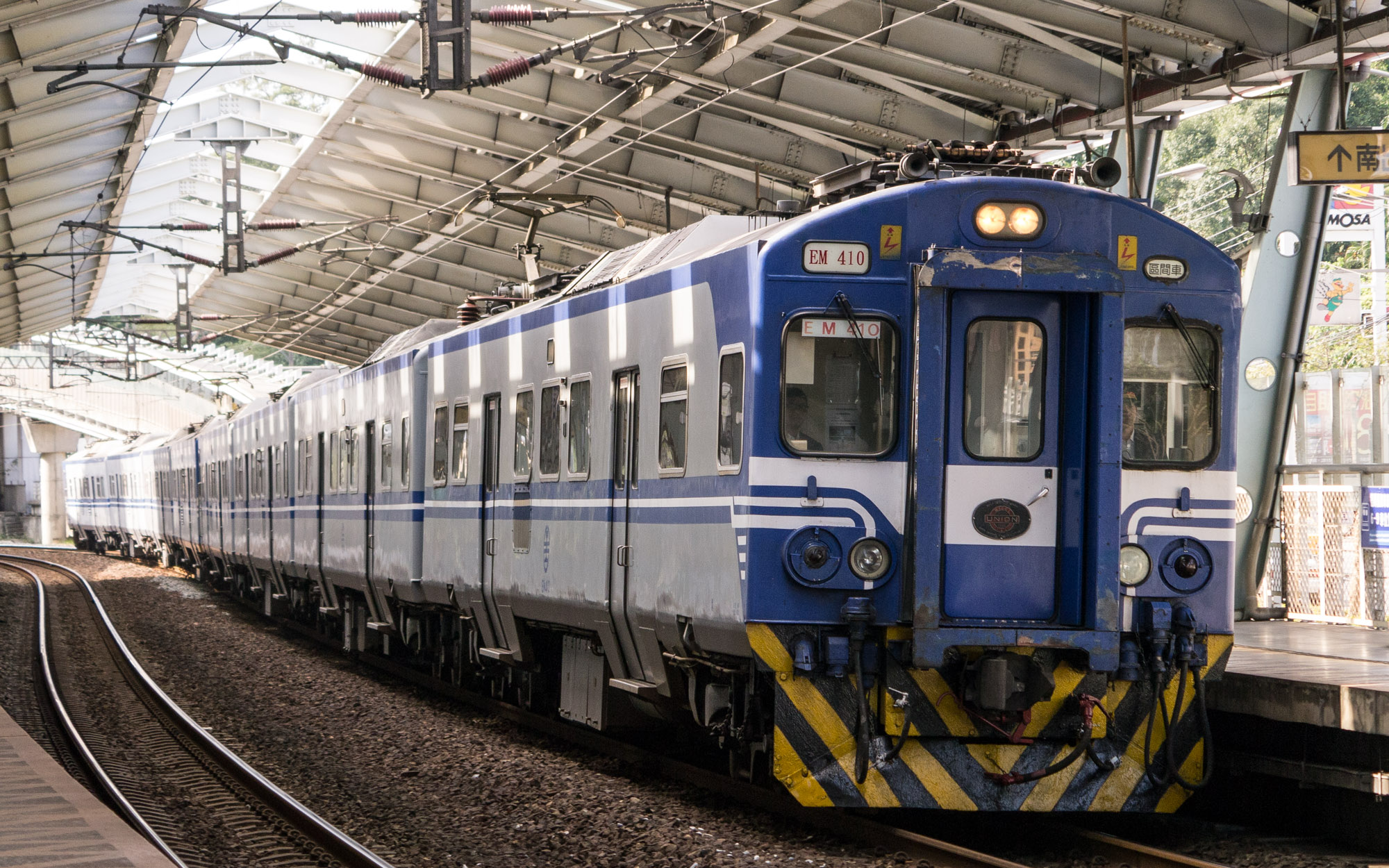 臺灣鐵路管理局第1198車次區間車（EMU410）順行西部幹線北段，停靠汐科車站。